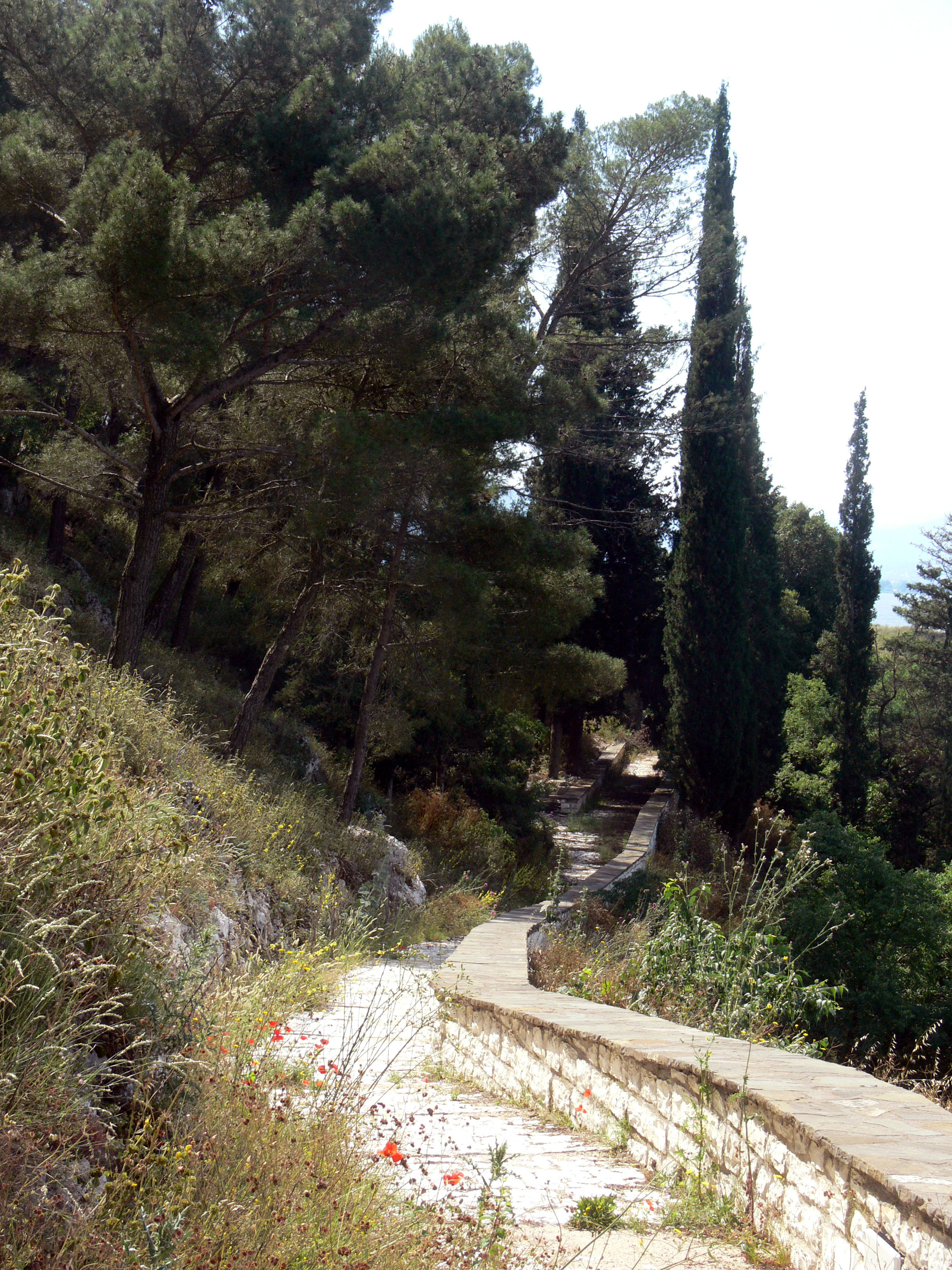 Auf der Insel Nesi im Pamvótida-See bei Joannina